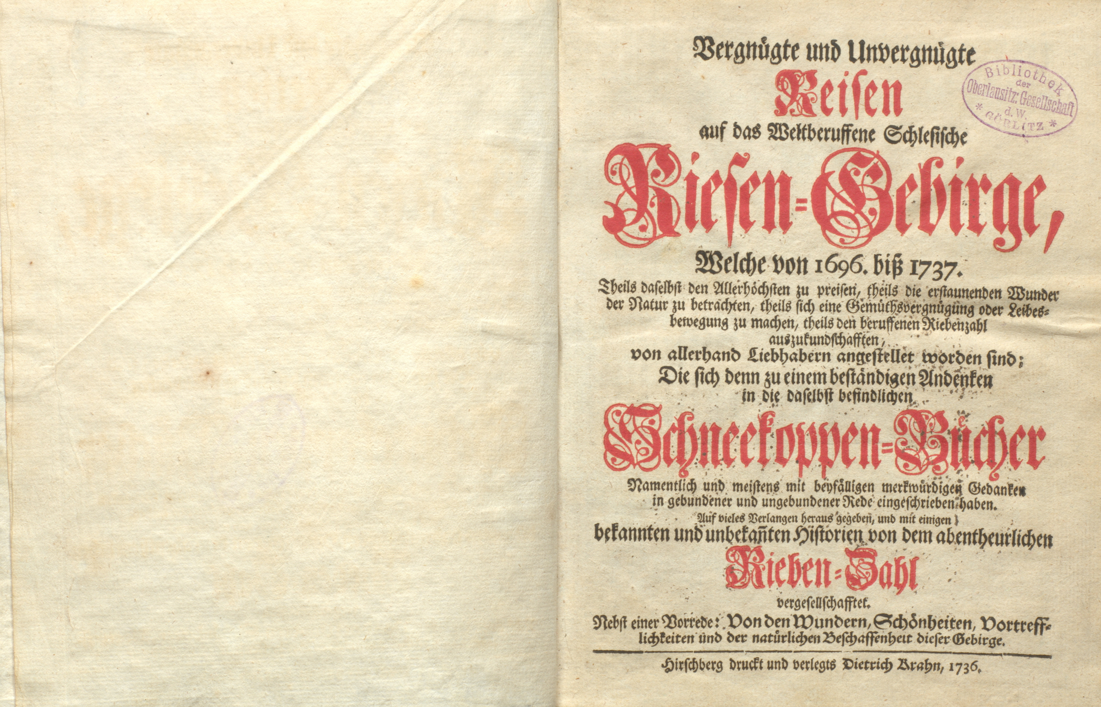 Oberlausitzische Bibliothek der Wissenschaften Buch von 1736: Vergnügte und unvergnügte Reisen auf das weltberuffene Riesen-Gebirge... mit Anekdoten aus den Jahren 1696 bis 1737. Das Erscheinungsdatum ist mit 1736 angegeben, die Geschichten bis 1737, der Widerspruch ist nicht erklärbar.